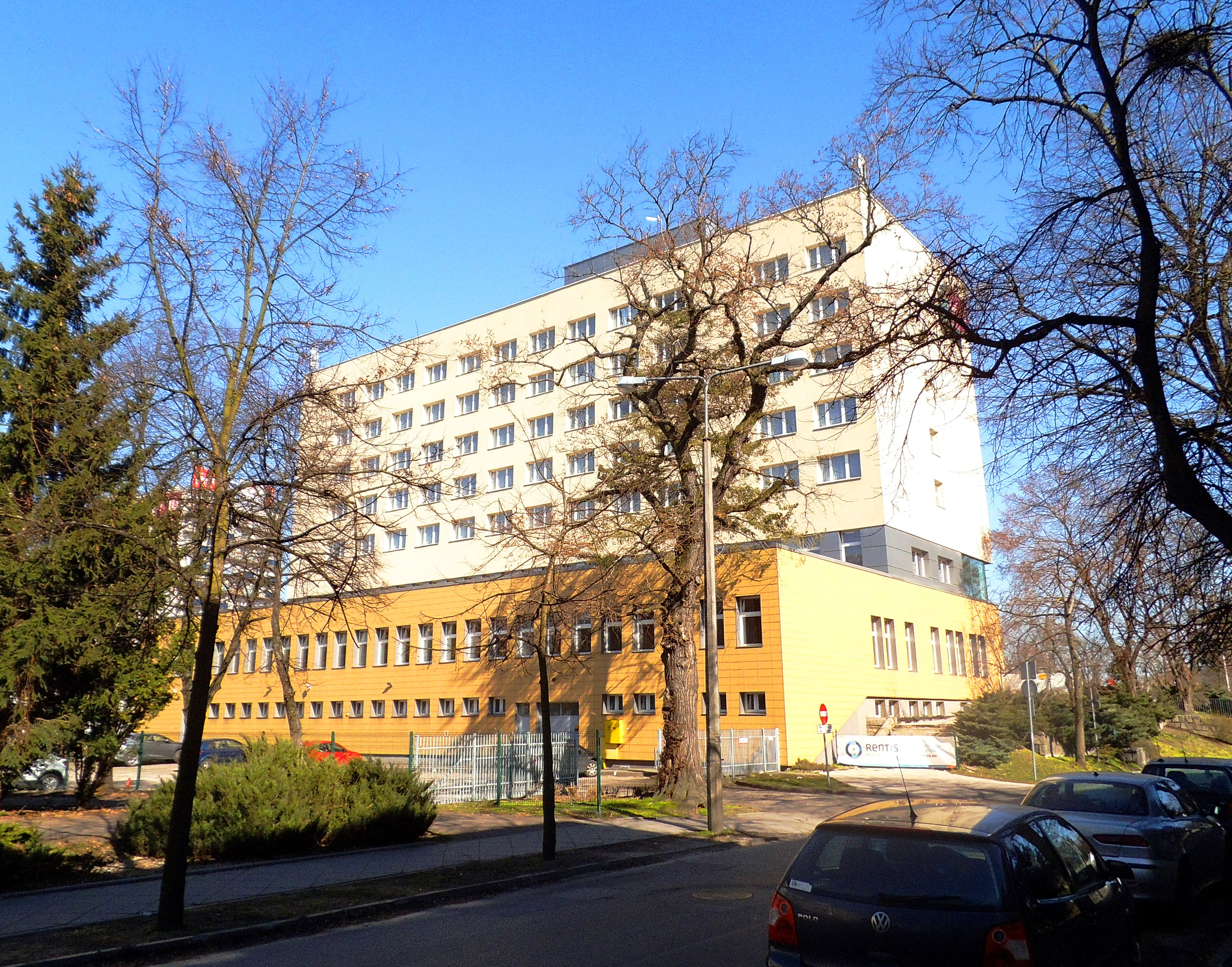 Hotel Mercure Toruń Centrum2020